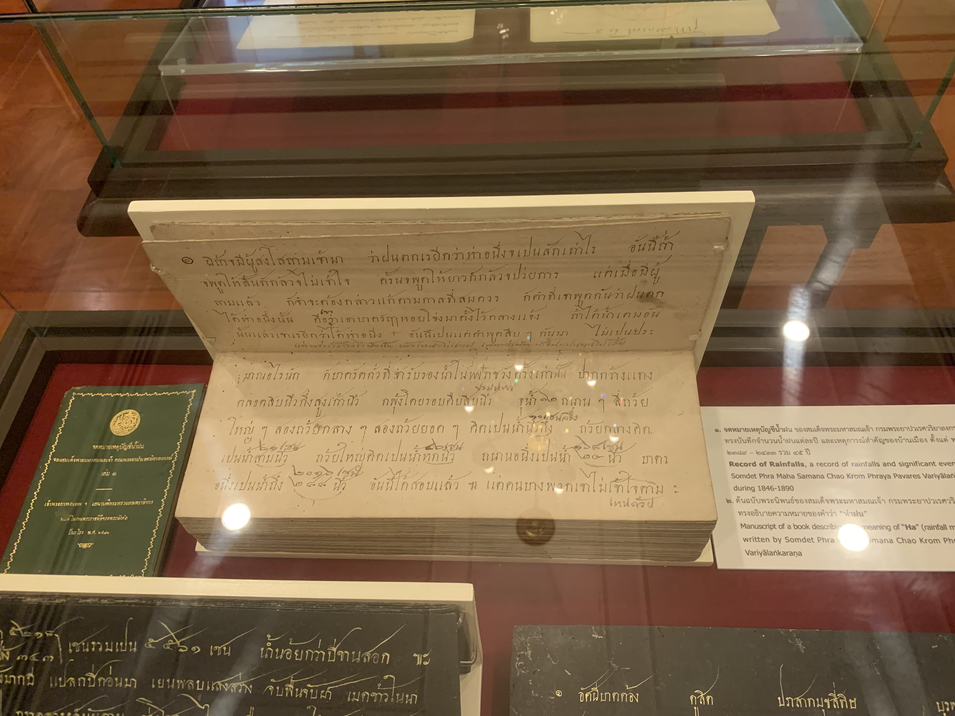 จดหมายเหตุบัญชีน้ำฝน และ พระนิพนธ์อธิบายความหมายของ "ห่าฝน" ในกรมพระยาปวเรศฯ